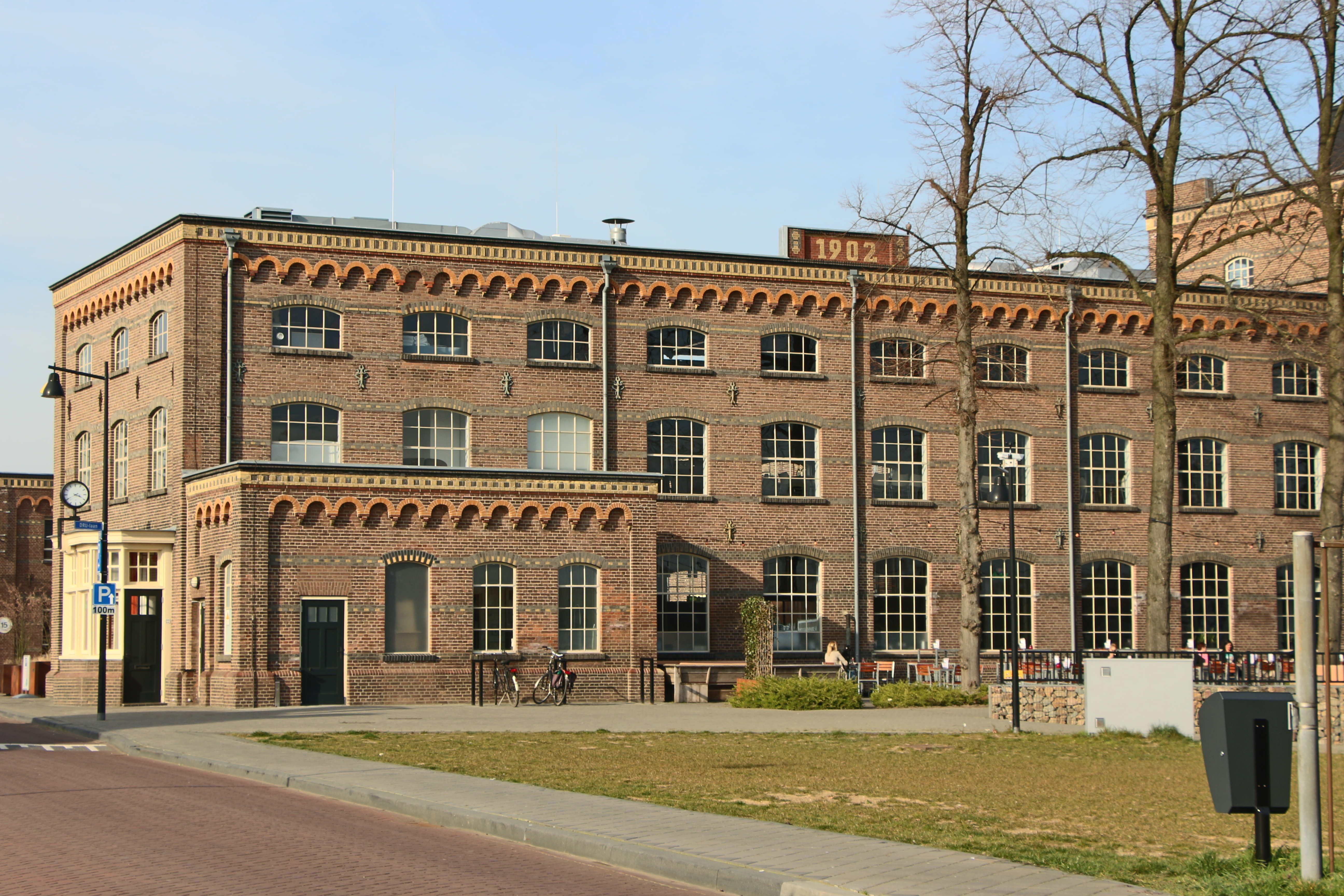 DRU, Ulft.